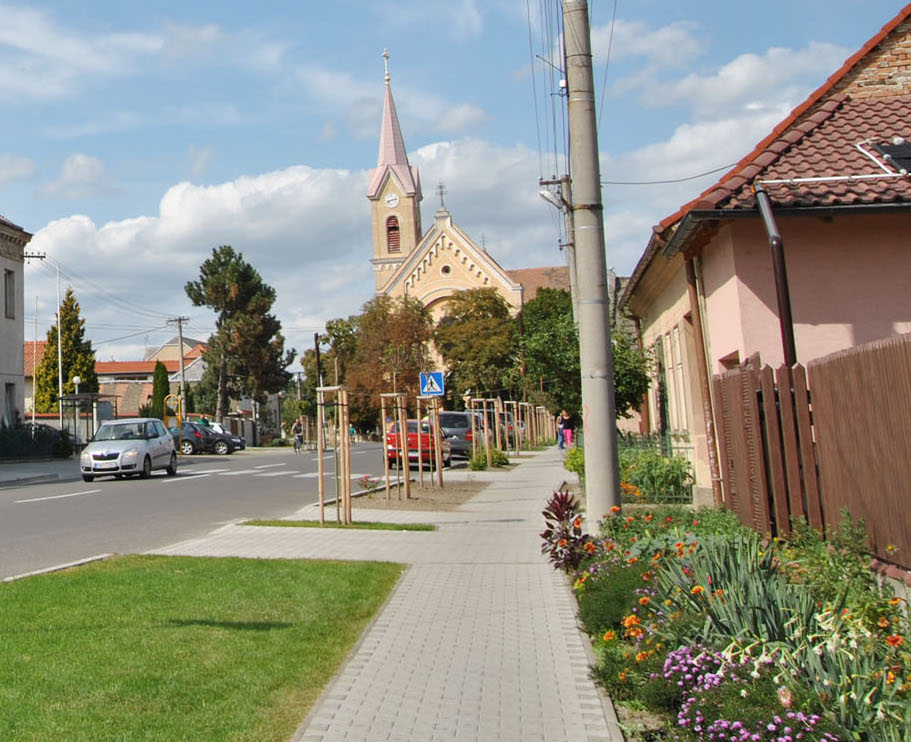 Vysoká pri Morave